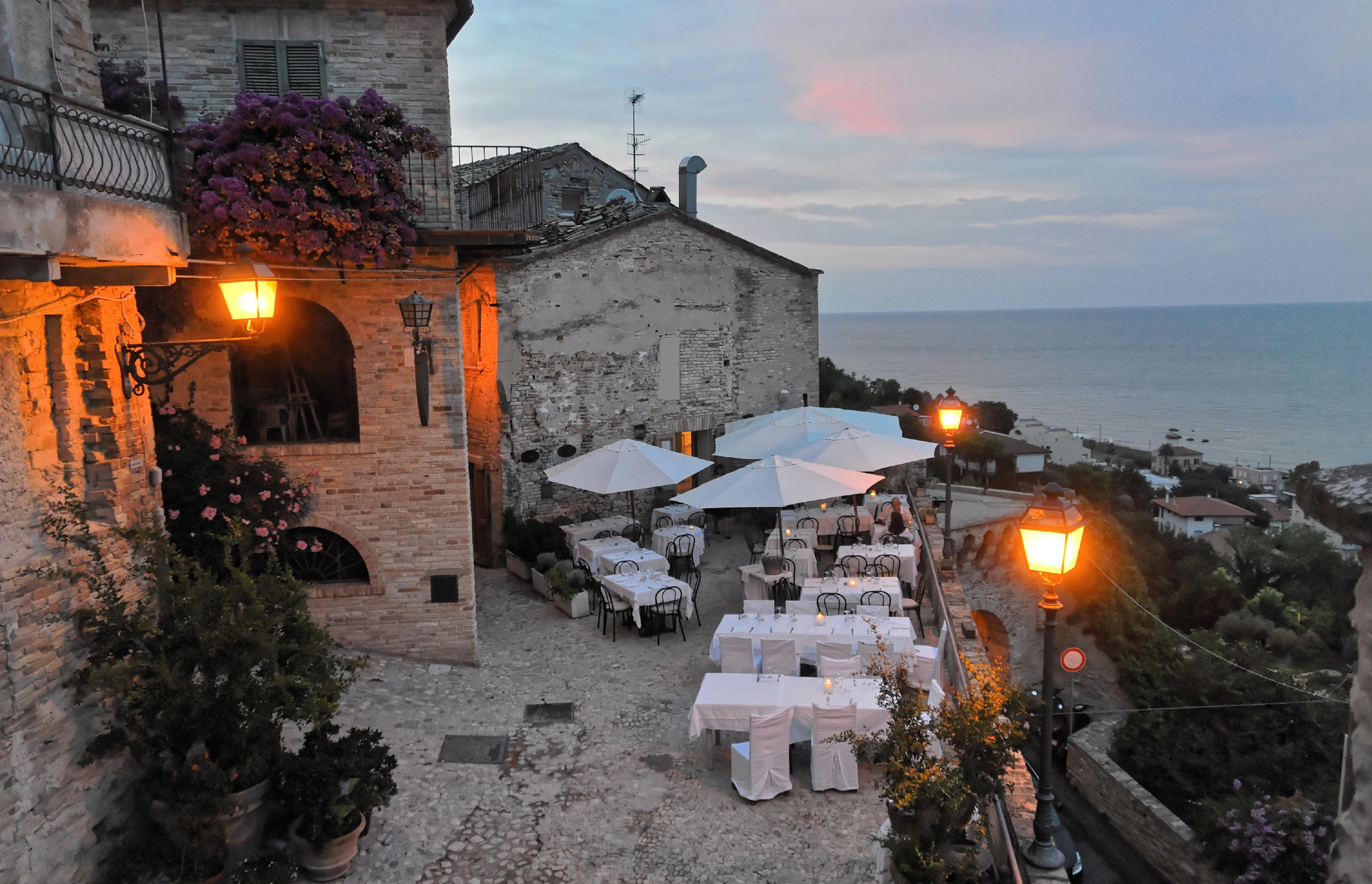 Grottammare 2013 Dieses Foto entstand in Zusammenarbeit mit Stadtbesichtigungen.de Die Seiten Stadtbesichtigungen.de, der dazugehörige Reise Blog sowie die Facebookseite: Stadtbesichtigungen Rom dürfen dieses Bild für Ihre Veröffentlichungen ohne den Hinweis auf Wikipedia, Commons bzw der Lizenz verwenden. Die Verantwortlichen habe von mir (Ra Boe) die Originaldaten zur freien Verfügung übermittelt bekommen.